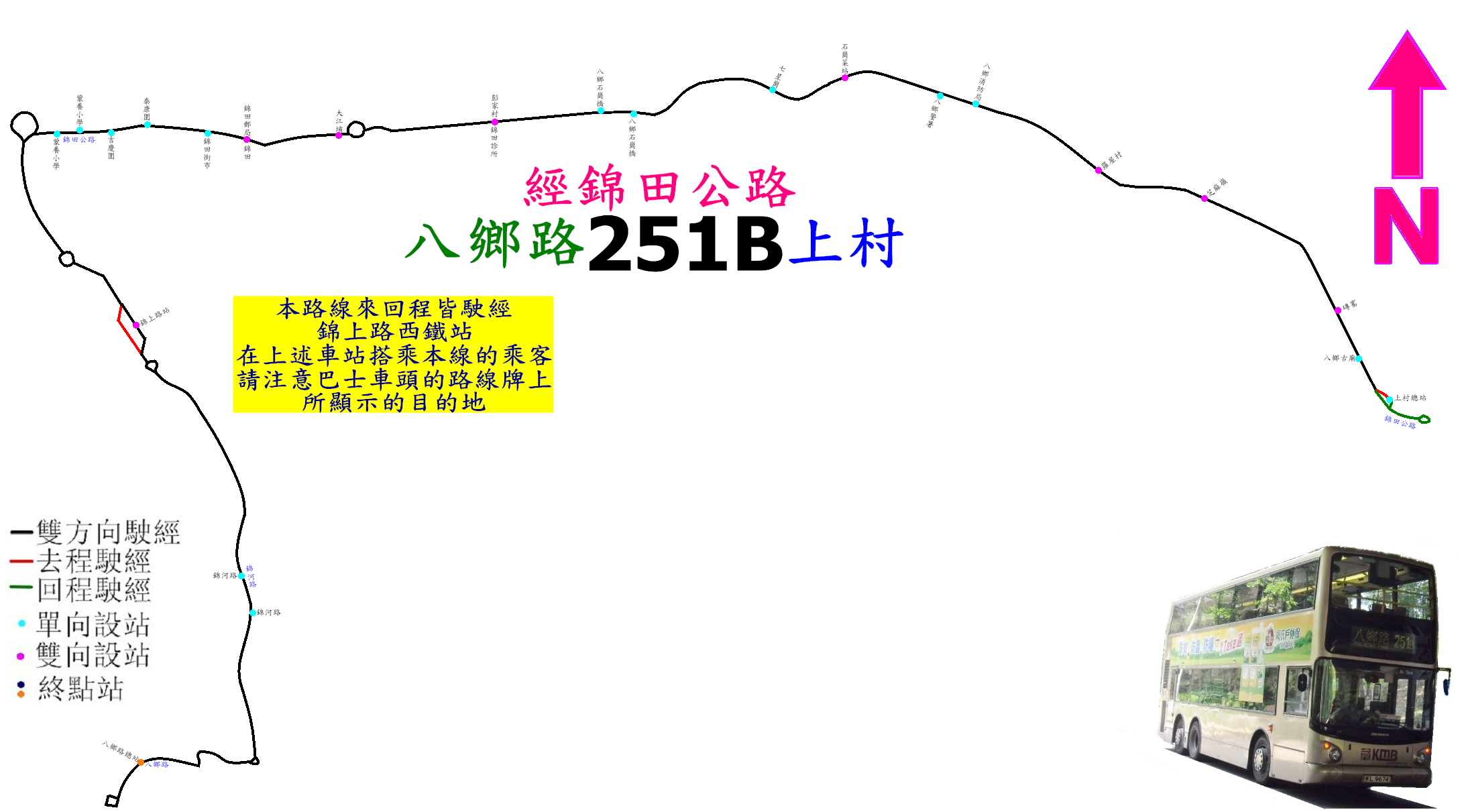 中文（香港）: 九巴251B線的走線圖